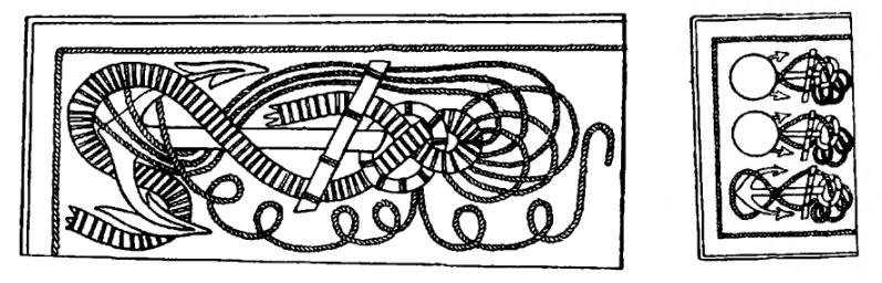 Шиття на комірі та клапанах Гвардійського флотського екіпажу. 1812 р. Згідно Розпису російських полків 1812 року. Додаток до "Військово-історичного вісника 1912.